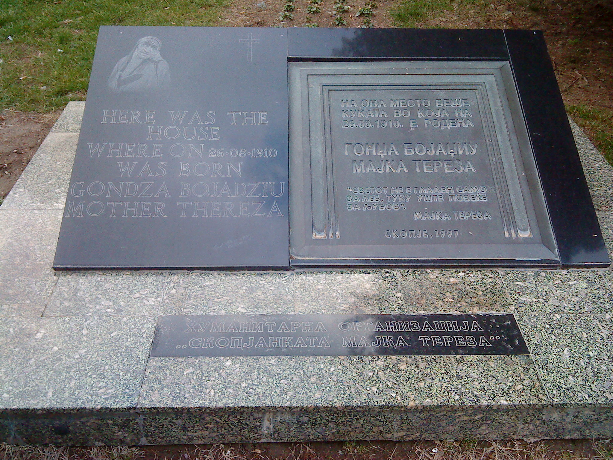 spomen-ploča na rodnom mistu majke Tereze u Skoplju